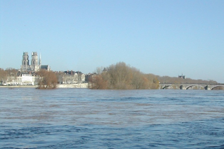 Die Loire in Orléans. Im Hintergrund die Kathedrale.